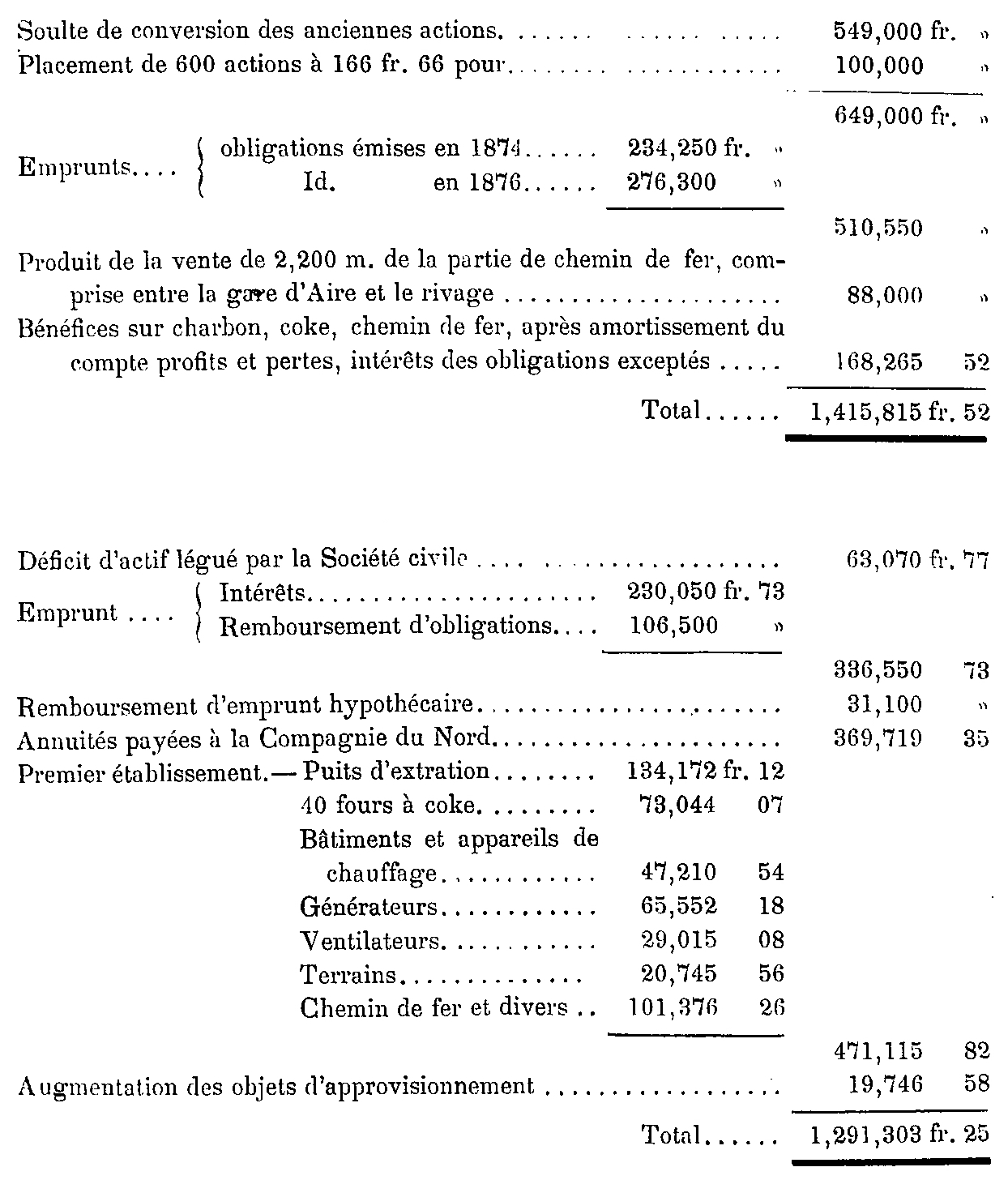 Recettes et dépenses de 1872 à 1877 de la Compagnie des mines de la Lys-Supérieure.